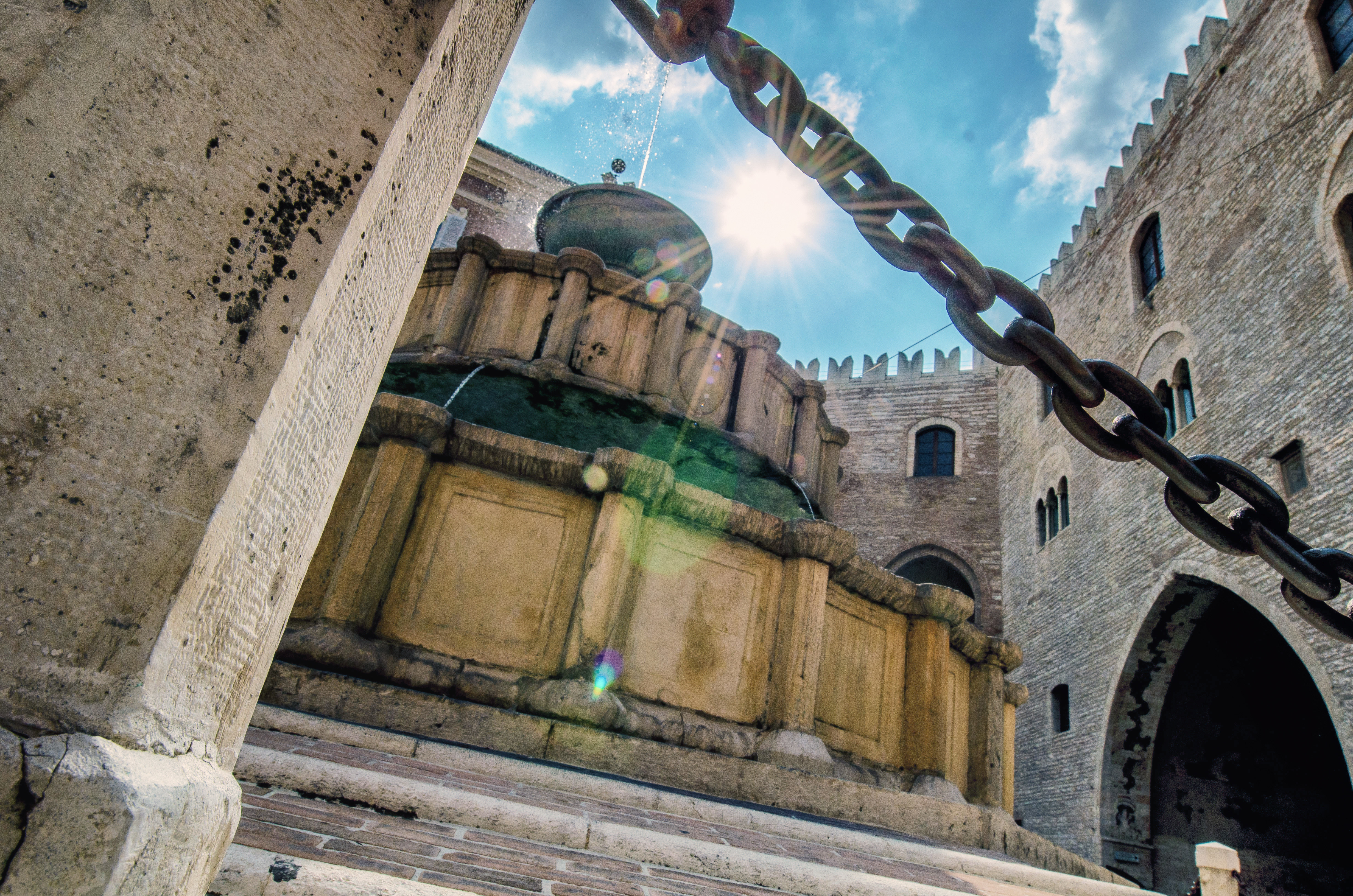 Fontana Sturinalto This is a photo of a monument which is part of cultural heritage of Italy.